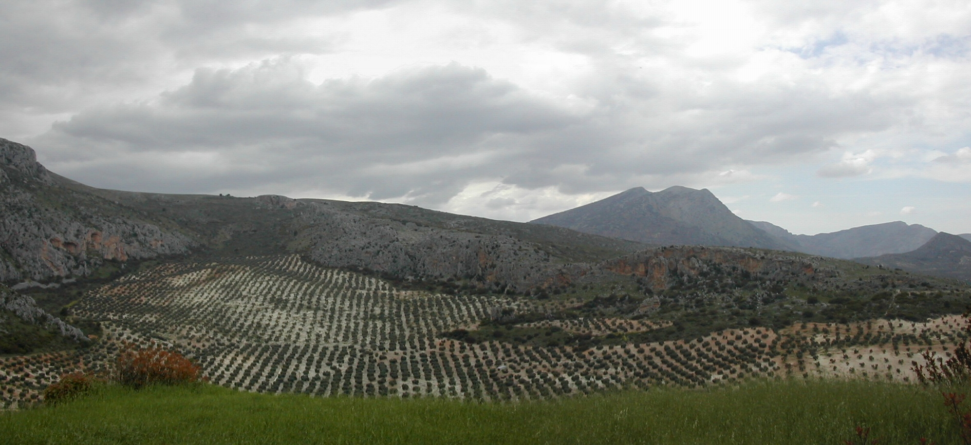 Panorámica del Cerro del Frontón en Otíñar (Jaén) desde el Cerro Veleta